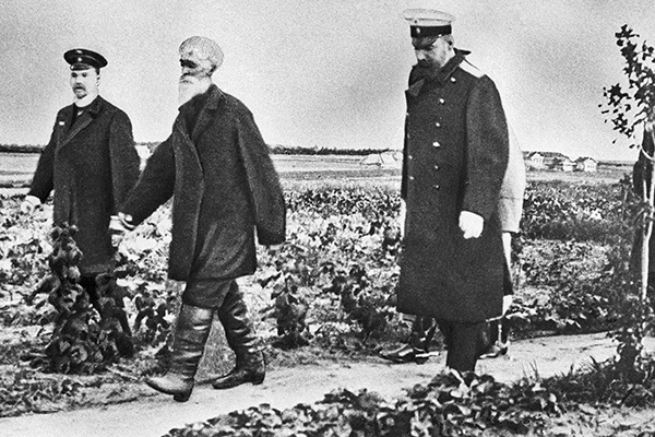 Петро Аркадійович Столипін (праворуч) під час знайомства з хутірським господарством недалеко від Москви